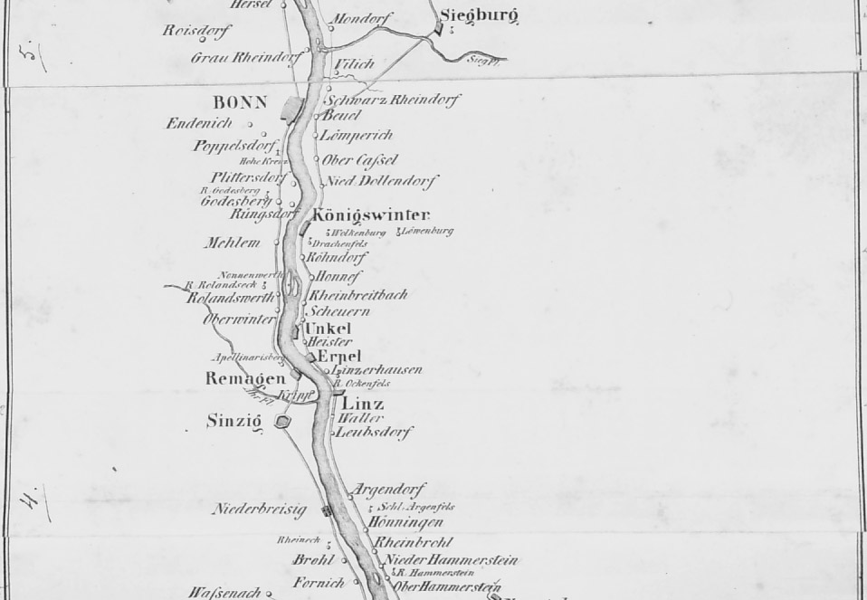 Rhein unterhalb Bonn